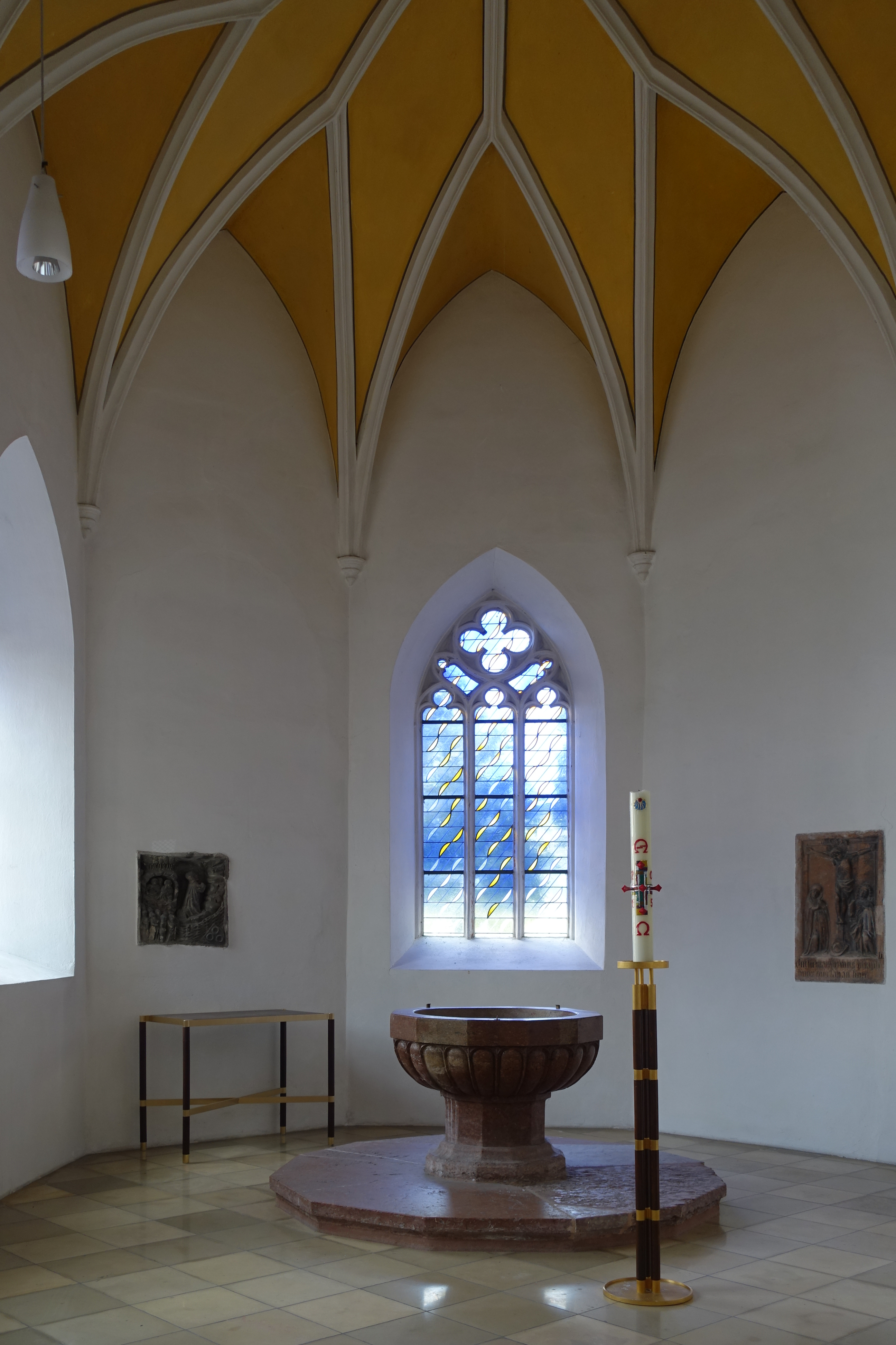 Taufbecken in der Taufkapelle